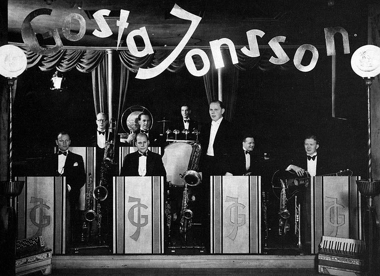 Gösta Jonsson